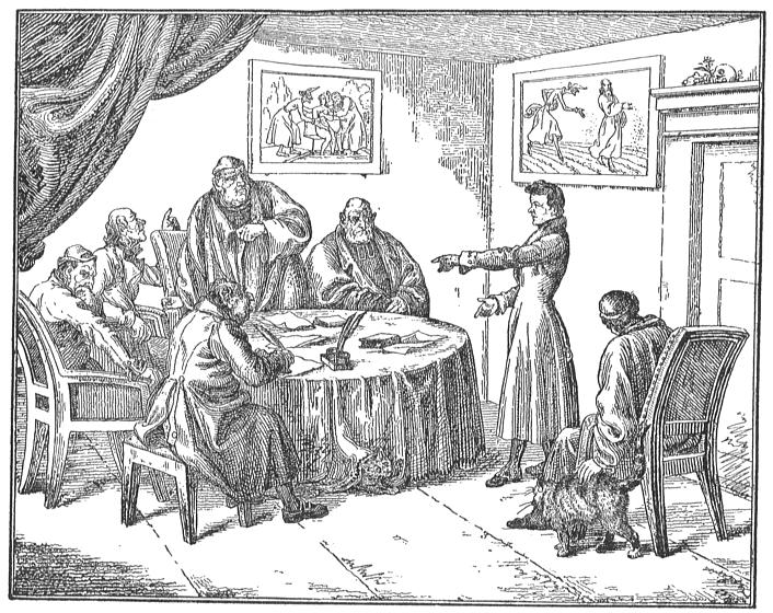 Martin Disteli, Prof. Alois Fuchs vor dem Ketzergericht, in: Republikanischer Kalender, 1834